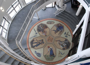 H.D. Tylle, Mosaic Grohmann Museum